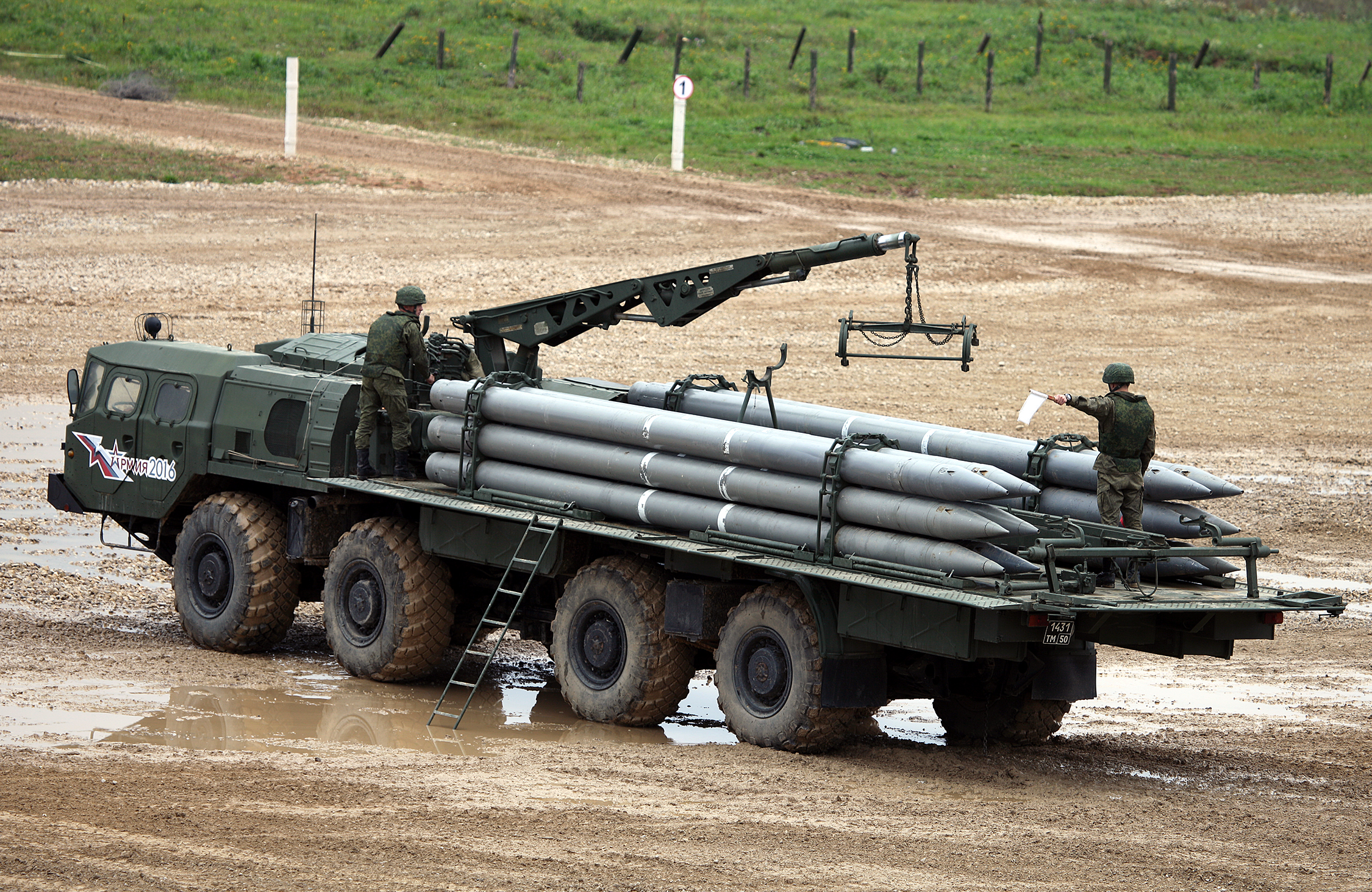 Транспортно-заряжающая машина 9Т234-2 РСЗО 9К58 Смерч (9T234-2 transporter-loader of 9K58 / BM-30 Smerch MLRS)